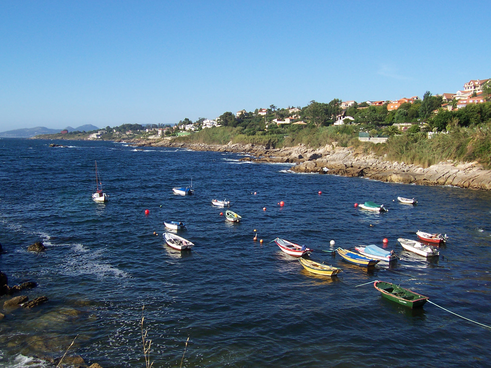 Portiño, Saiáns, Vigo. Vista ó mar